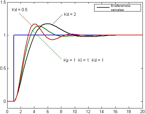 Deribatua